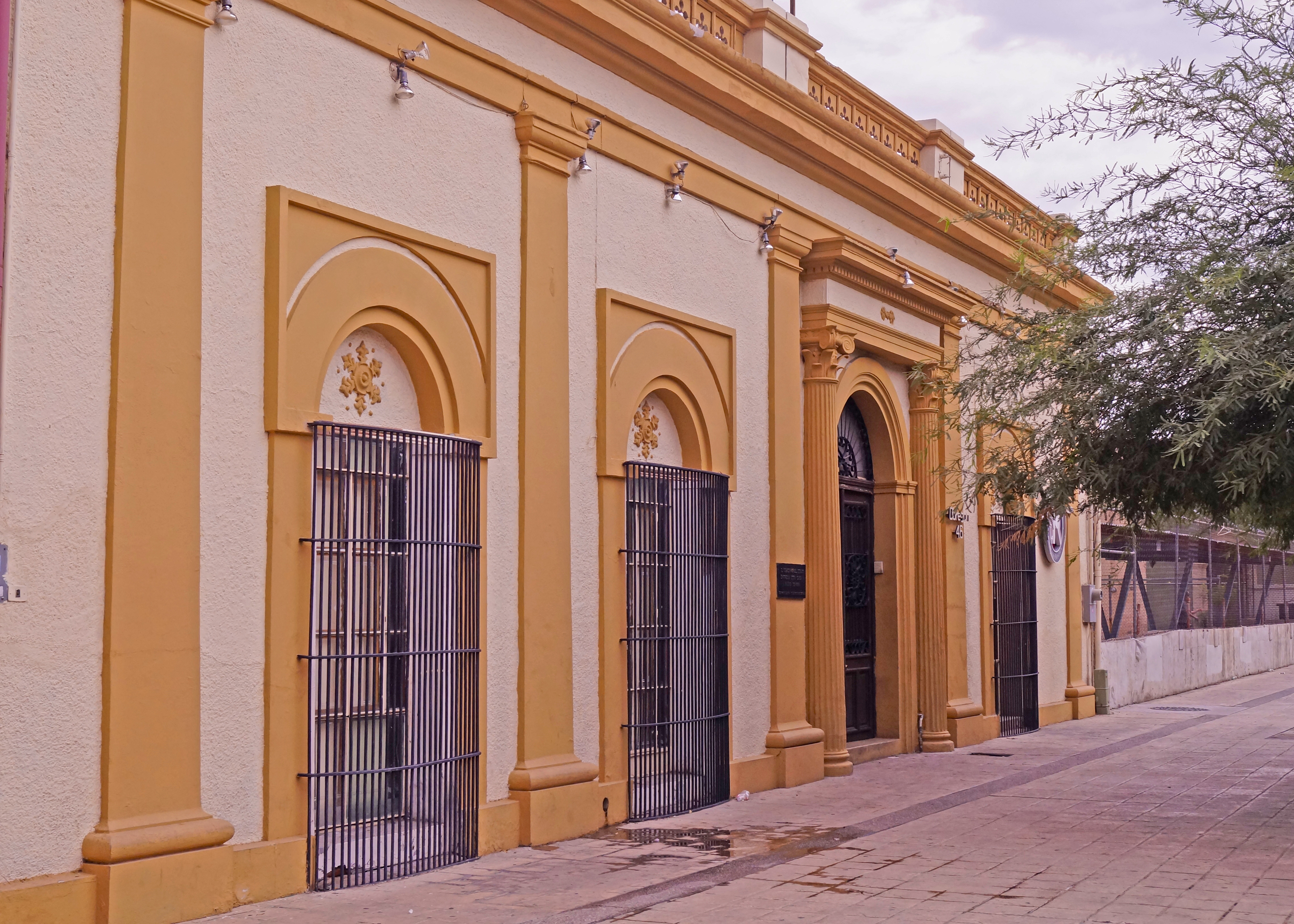 Fachada de Radio Sonora, en Hermosillo. Radiodifusora oficial del Estado de Sonora. México.